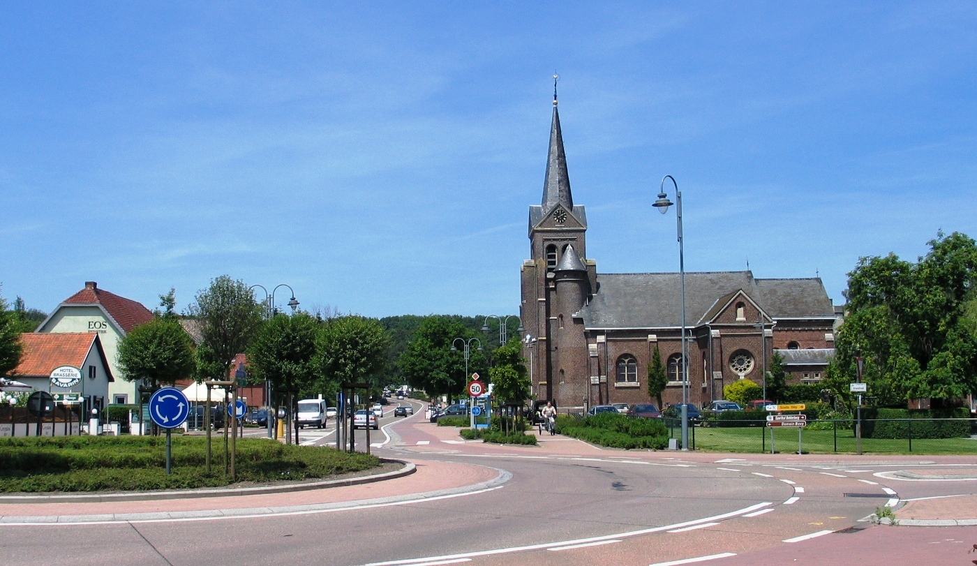 Bolderberg - eigen foto